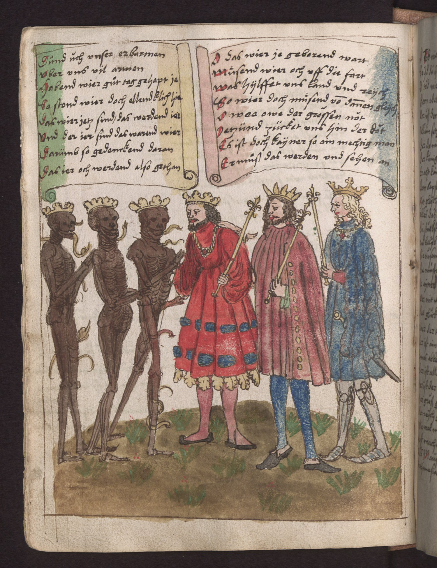 Seite aus dem Vergänglichkeitsbuch des Wilhelm Werner von Zimmern, Württembergische Landesbibliothek, Cod. Don. A III 54, fol. 21v, Die drei Lebenden und die drei Toten